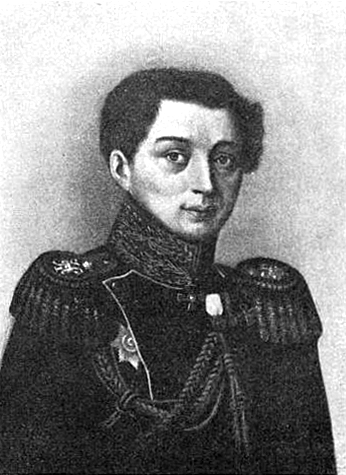 Это изображение было использовано для иллюстрирования статьи «Исленьев, Николай Александрович» опубликованной в одиннадцатом томе «Военной энциклопедии», который был издан книгоиздательским товариществом И. Д. Сытина в 1913 году в столице Российской империи городе Санкт-Петербурге.